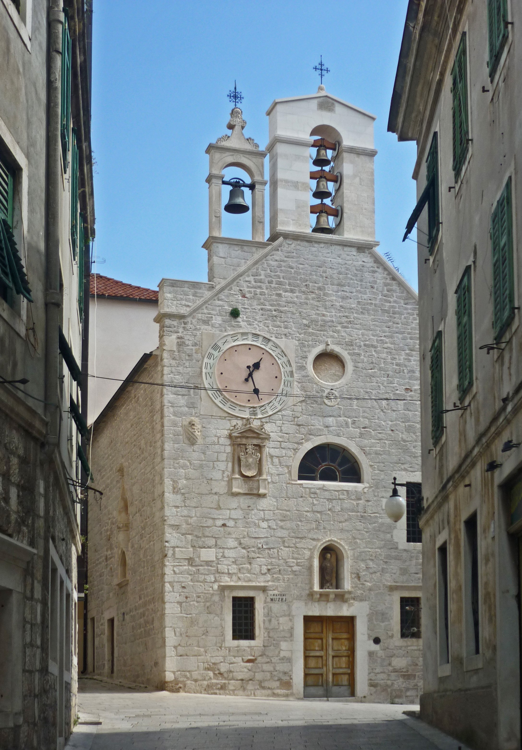 Barbarakirche in Šibenik (dt.: Sibenning, ital.: Sebenico), jetzt Museum